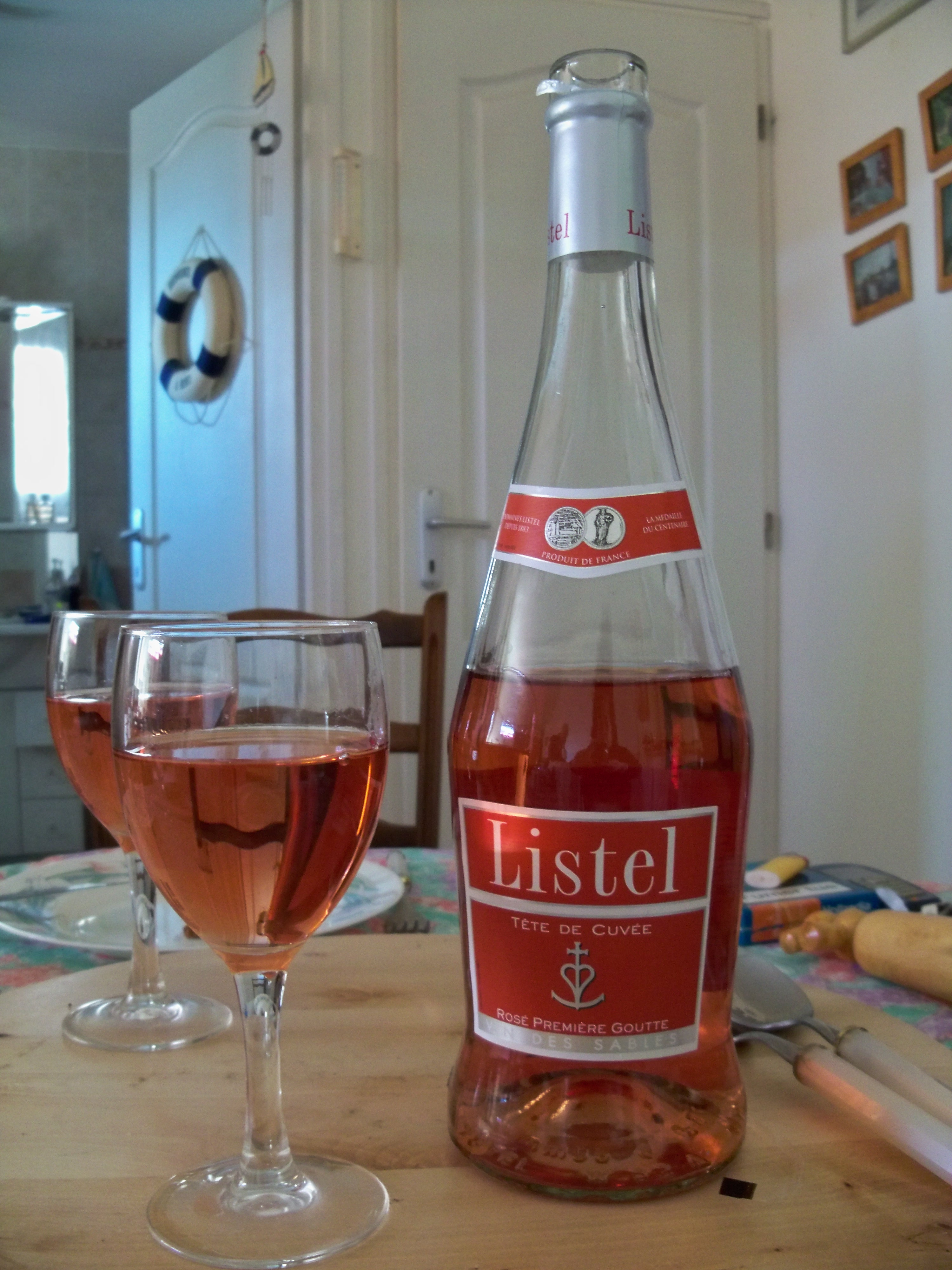 Bouteille de Listel rosé